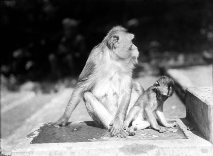 Negatief. Een aap (Cercopithecidae) met een jong in Wendit, Oost-Java